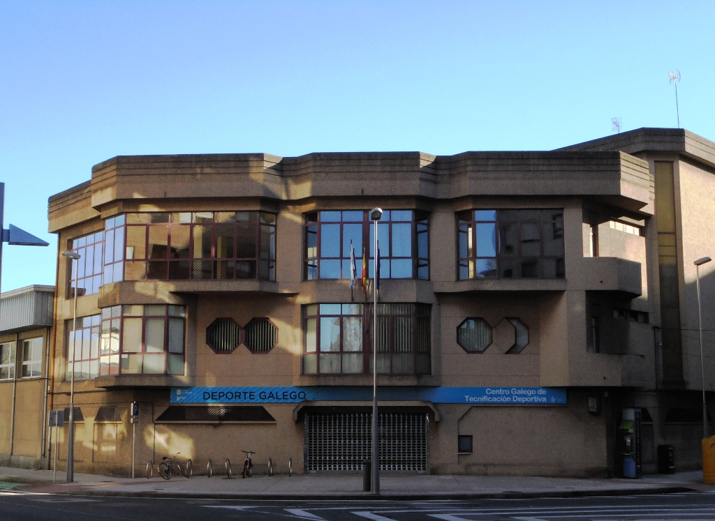 Centro Gallego de Tecnificación Deportiva en Pontevedra capital